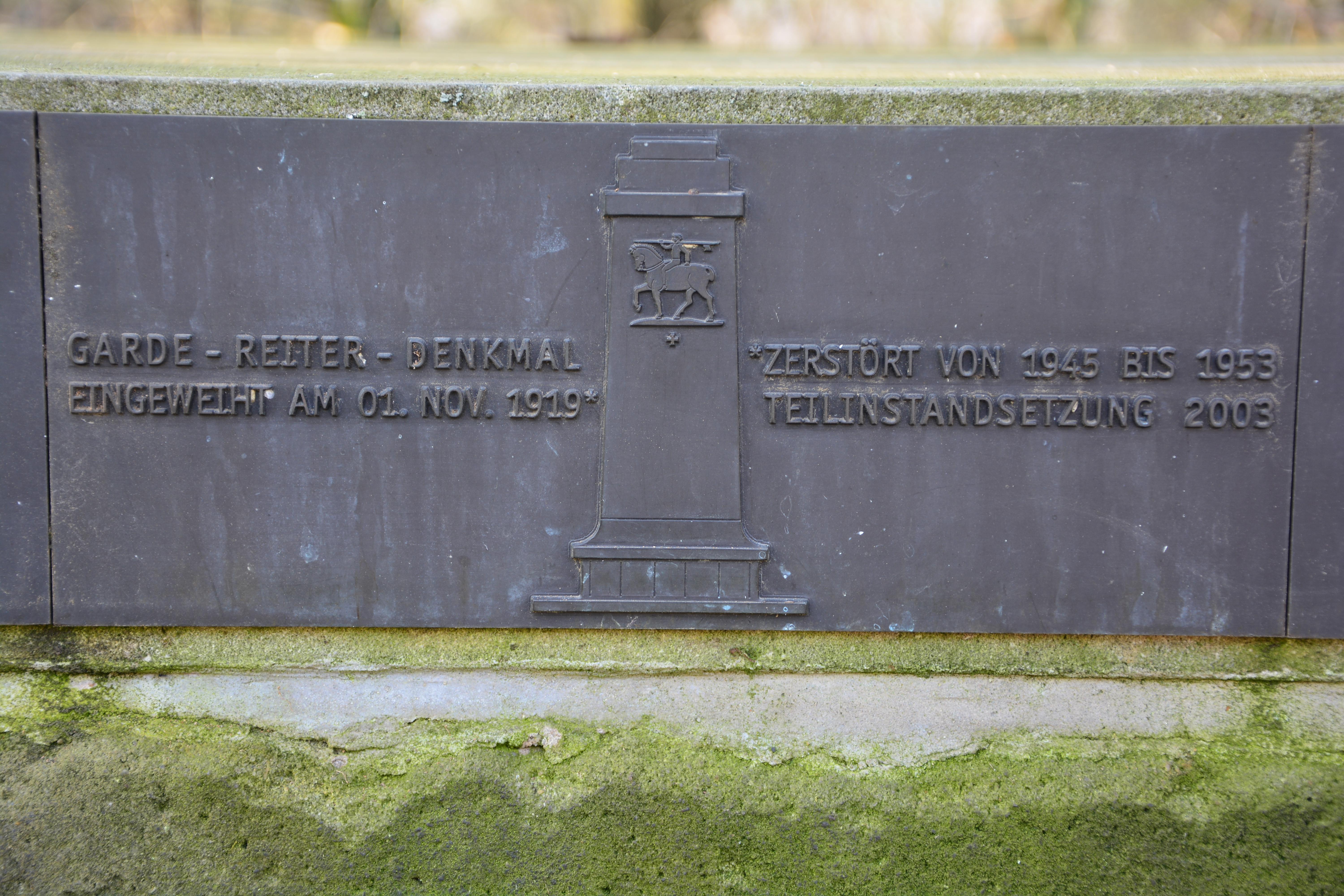 Dresden, Stauffenbergallee 12 (gegenüber) Garde-Reiter-Denkmal 2018, Photos by User:Bybbisch94